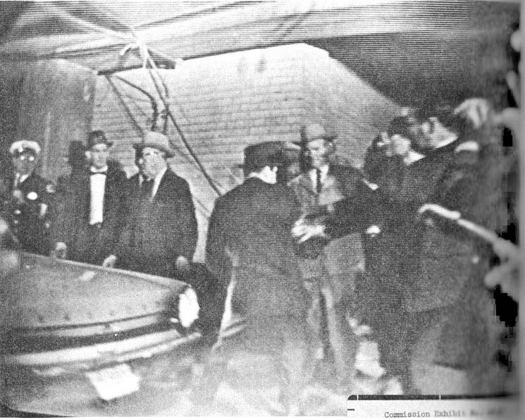 Warren Commission Exhibit #2636